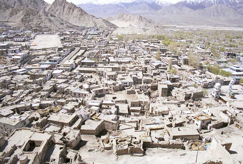 Leh in Ladakh.